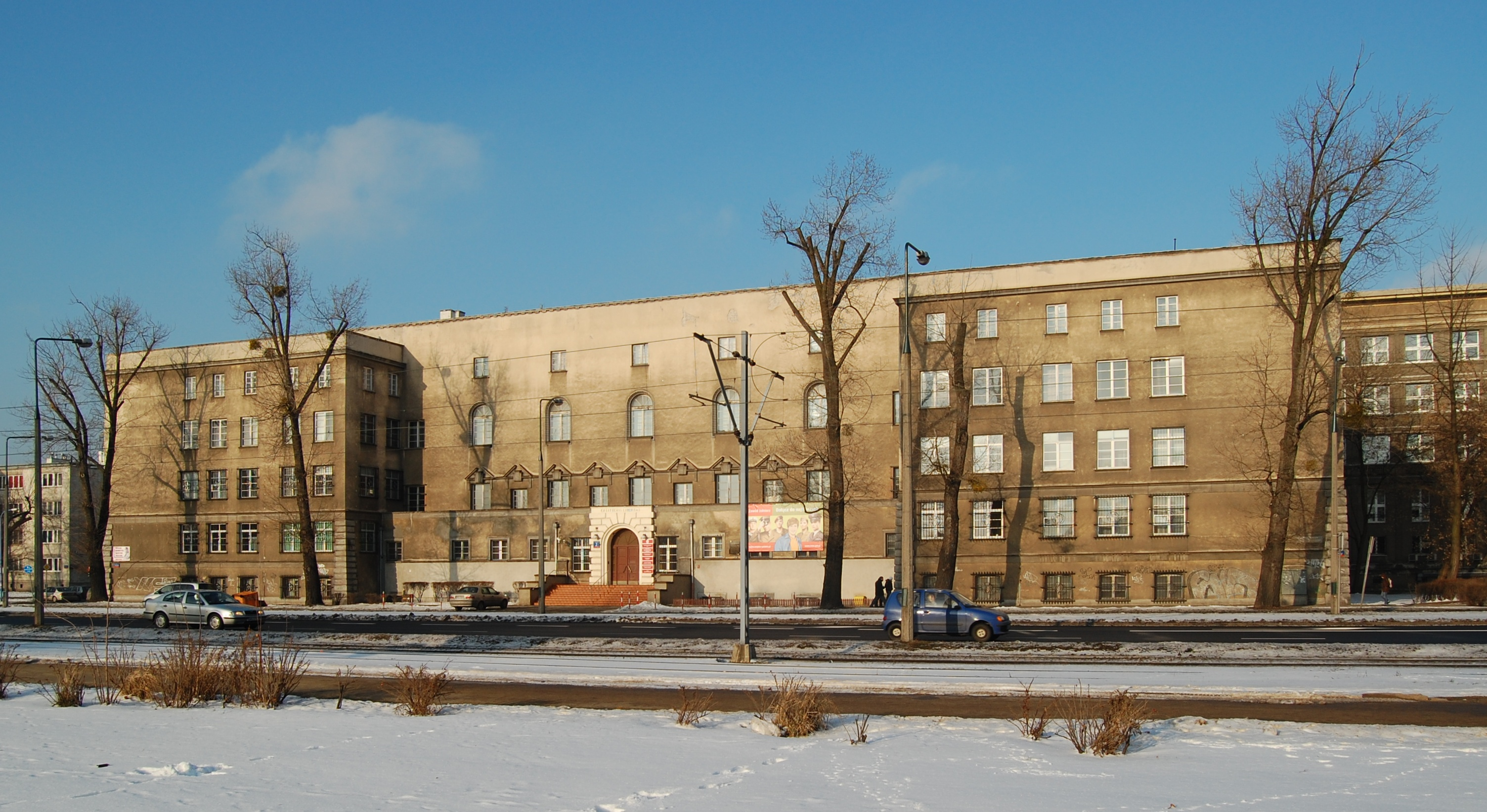 Dawny budynek Wolnej Wszechnicy w Warszawie przy ulicy Banacha 2. Obecnie kompleks budynków wojskowych (m.in. Dom Wojska Polskiego) z częścią należącą do Uniwersytetu Warszawskiego.